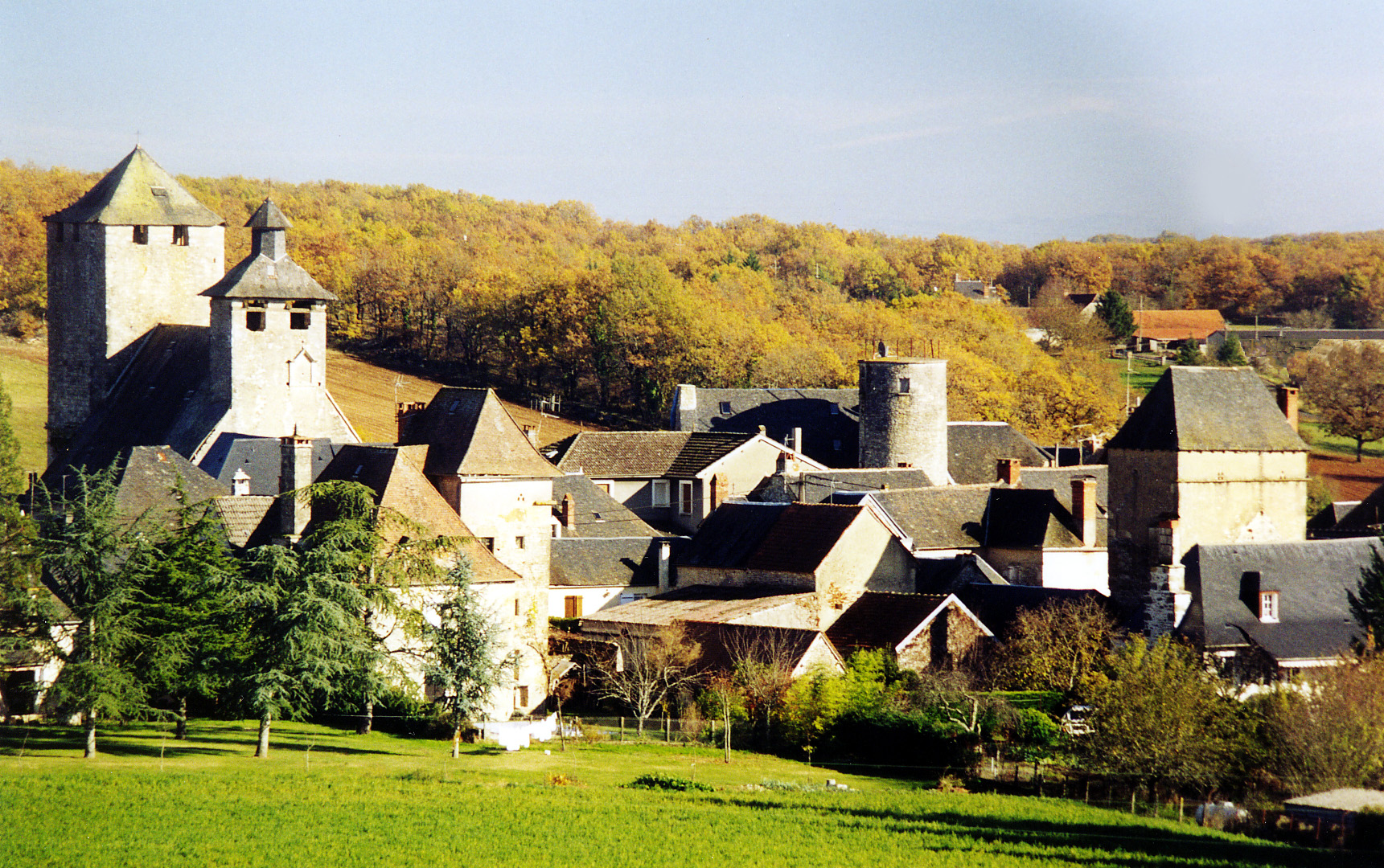 Vue générale de Gignac Lot